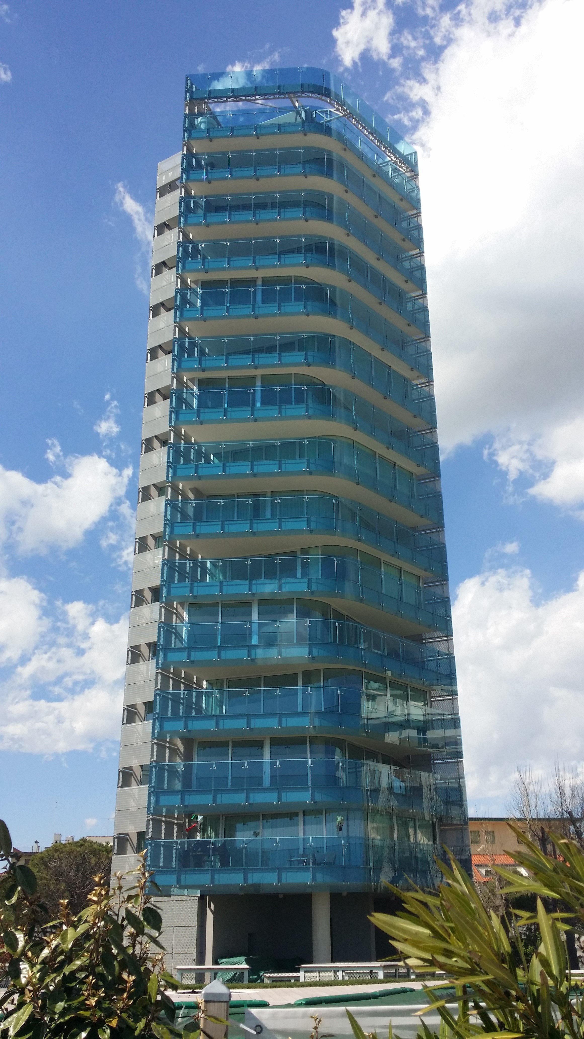 La G-tower di Piazza Marina a Jesolo